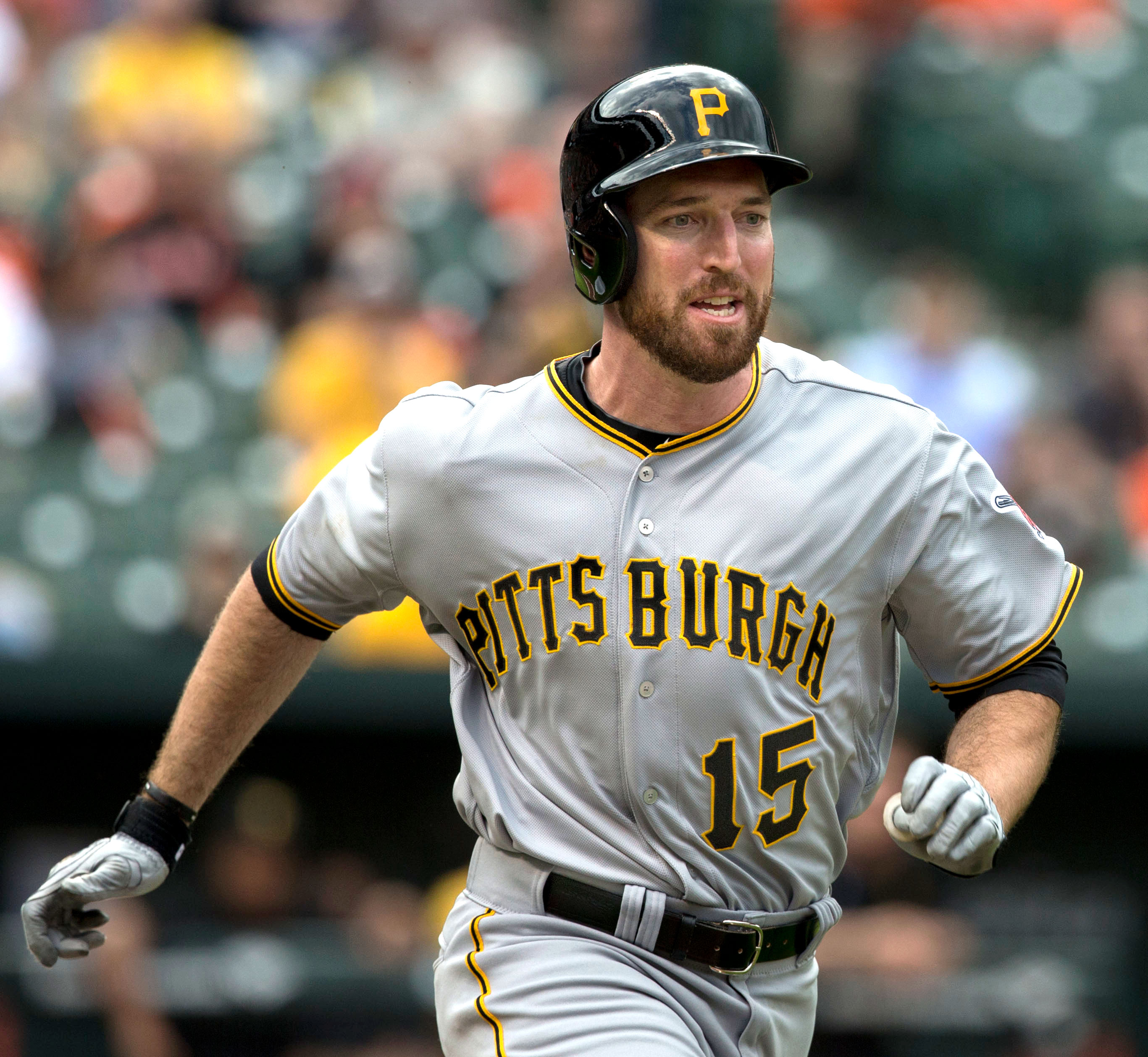 Ike Davis